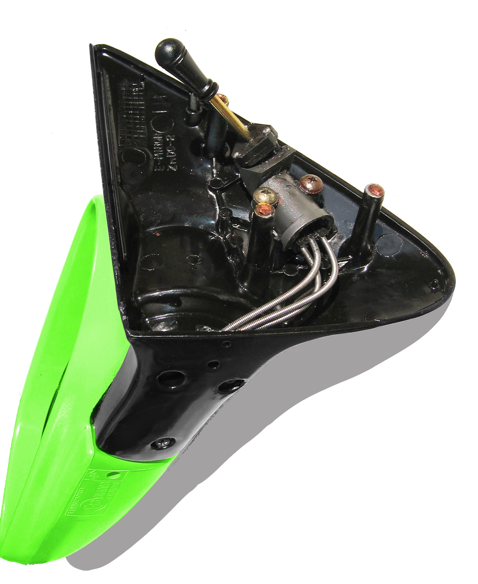 Innenverstellbarer Außenspiegel (Rückspiegel) mit 3-Punkt-Zwangssteuerung (Bowdenzug)